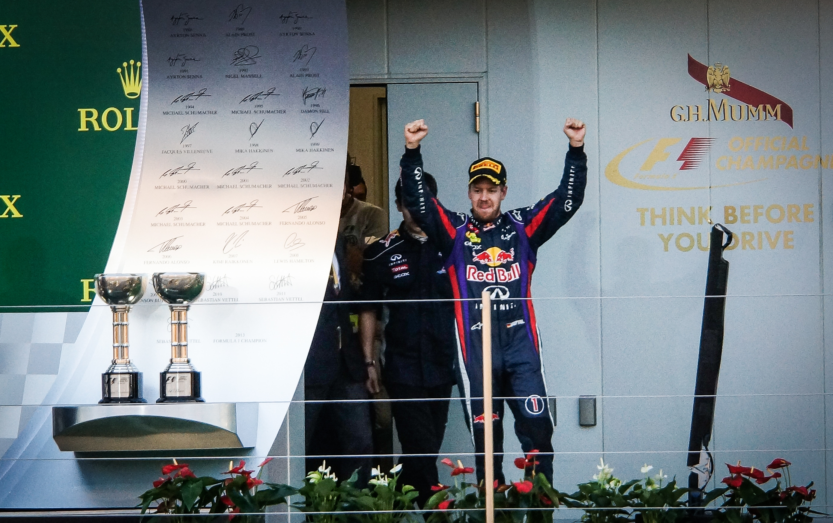 Sebastian Vettel, vainqueur du Grand Prix du Japon 2013